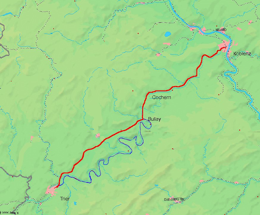 Karte der Moselbahn, Selbst erstellt, Grundlage: [1], GNU FDL